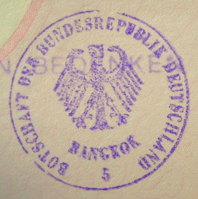 Kleines Dienstsiegel der Botschaft der Bundesrepublik Deutschland (in) Bangkok